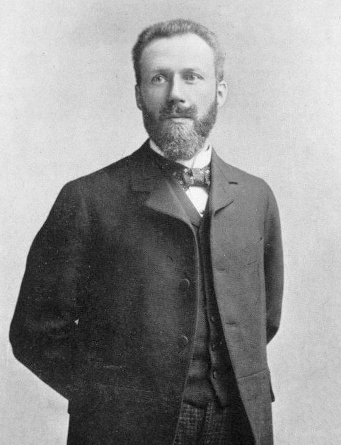 Pierre Delbet (November 15, 1861 - 1957)